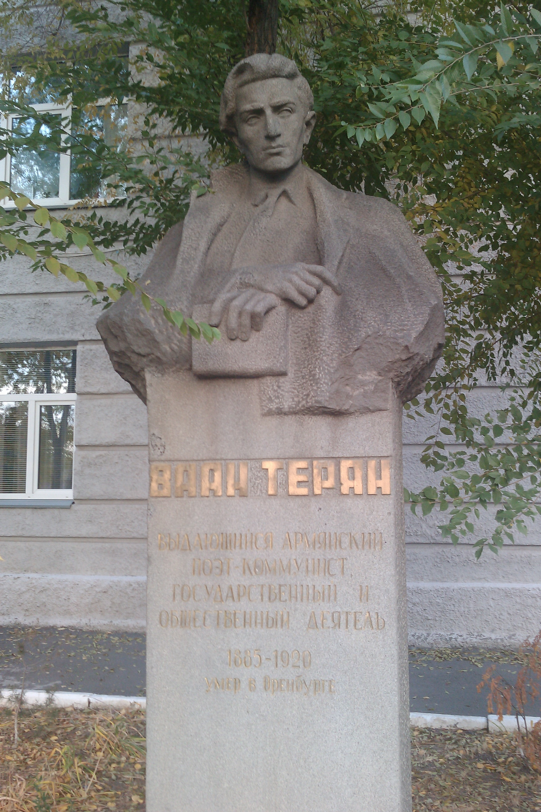 Памятник армянскому поэту-коммунисту Ваану Терьяну в Оренбурге на улице Чичерина 38